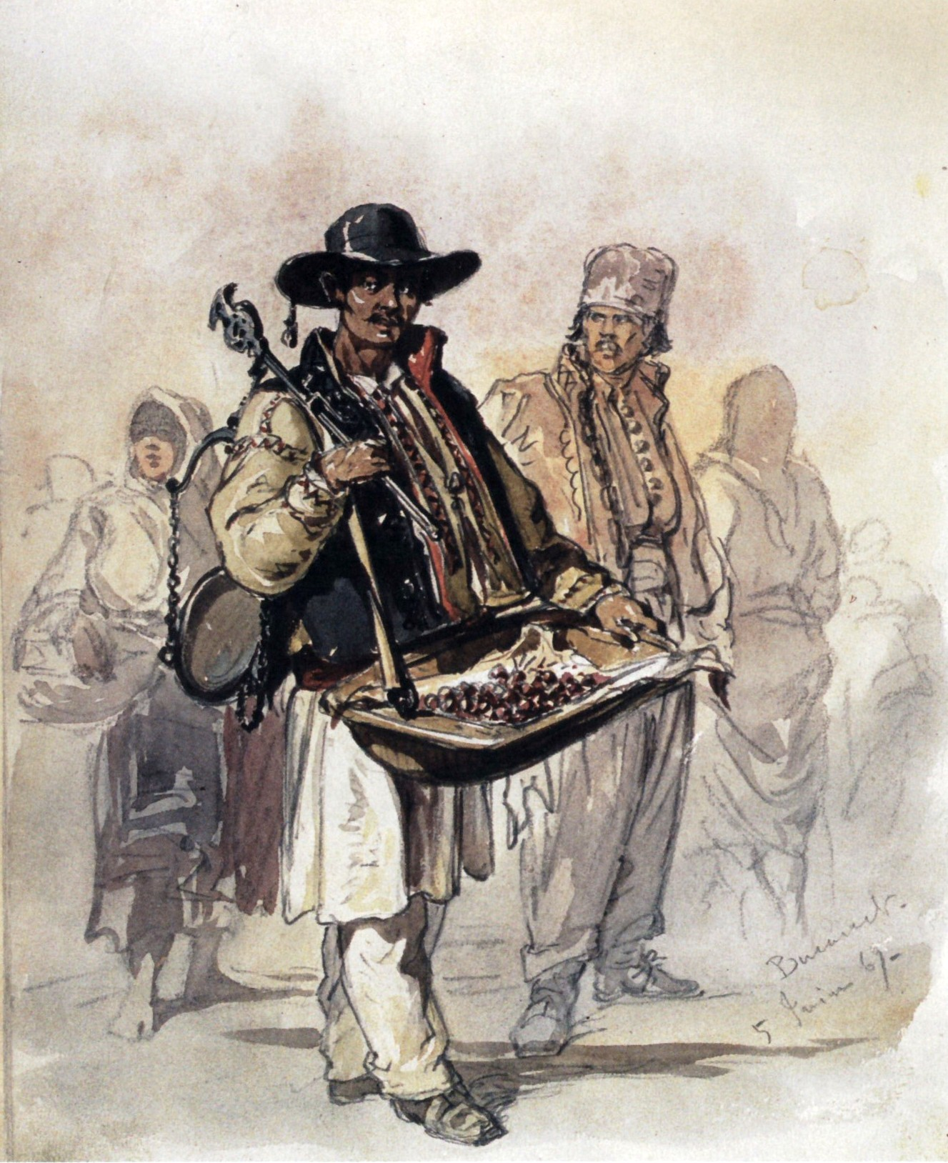 Oltean cu cireșe - Muzeul Municipiului București